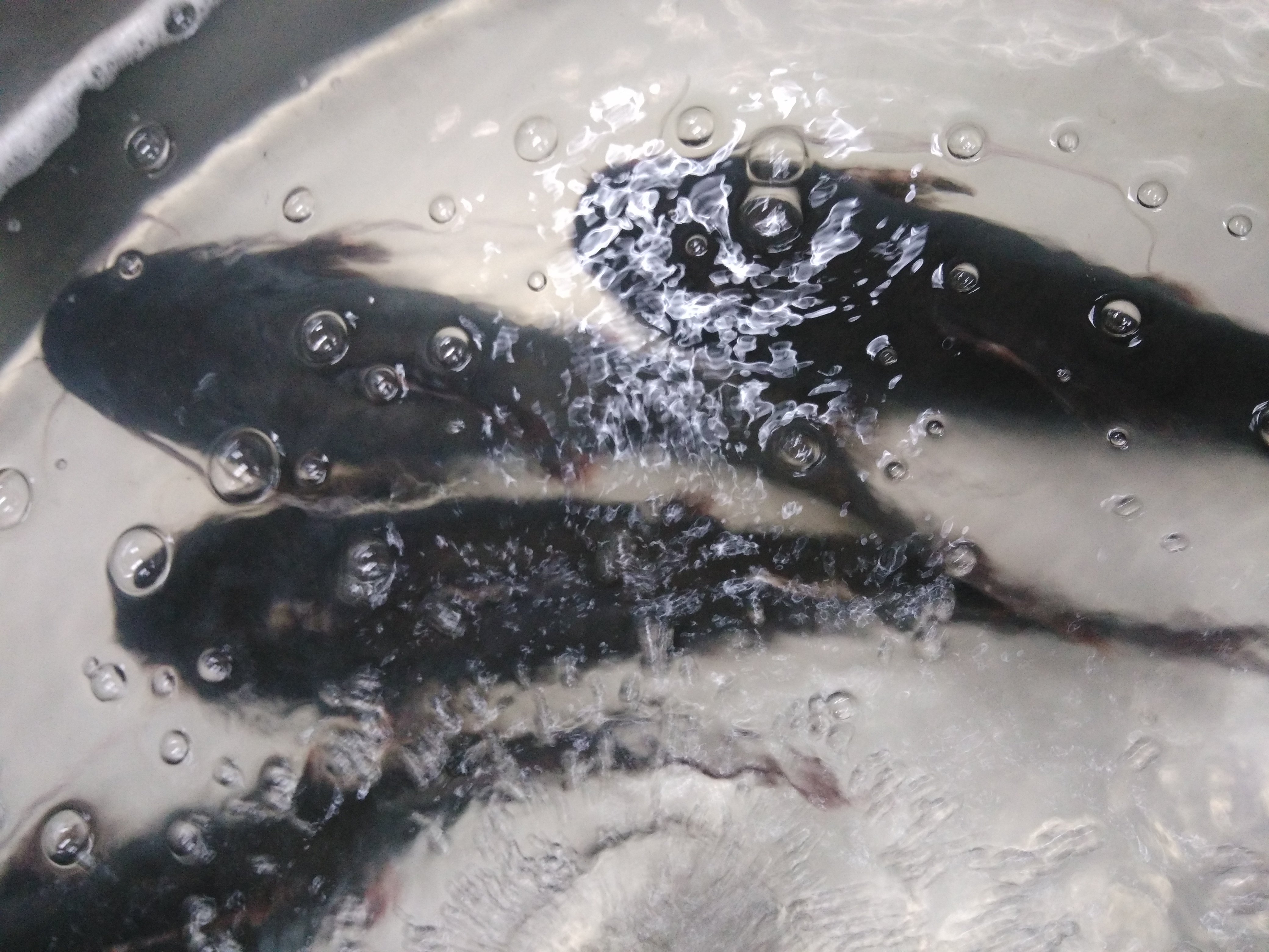 Cá hú 3 tại siêu thị